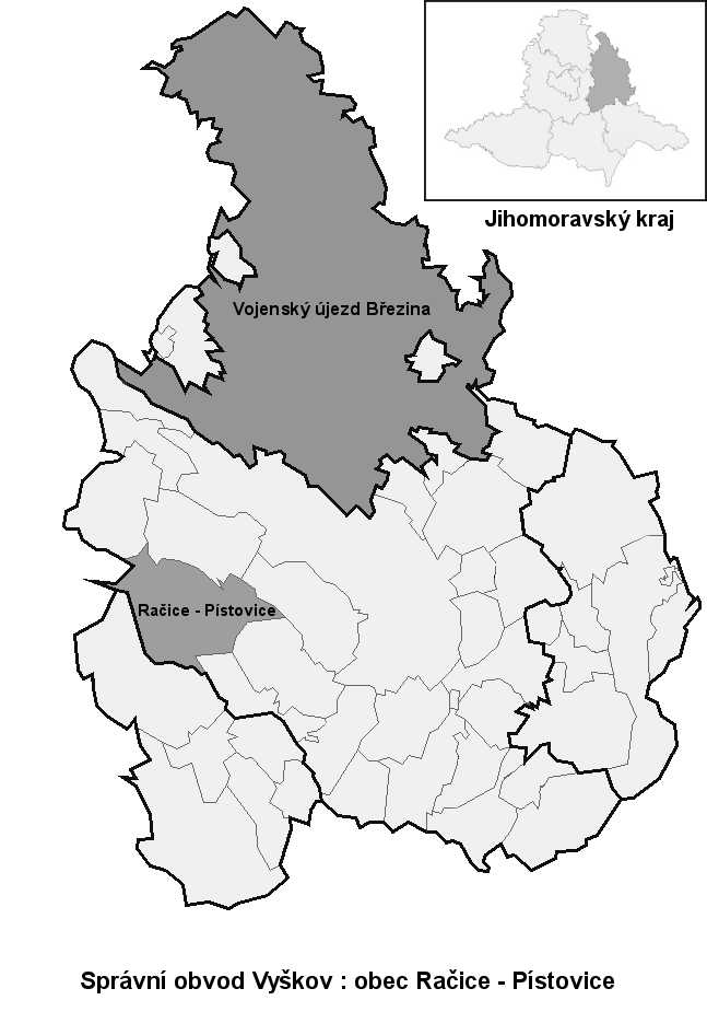 Hranice Račice_-_Pístovice (Vyškov- czech republic)